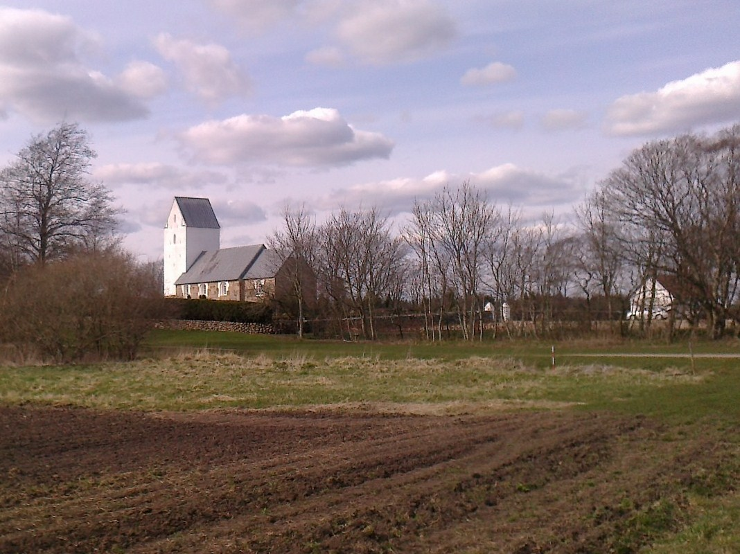 Nørre Omme Kirke i det sogn, der gav Ørnhøjbanen sit første navn